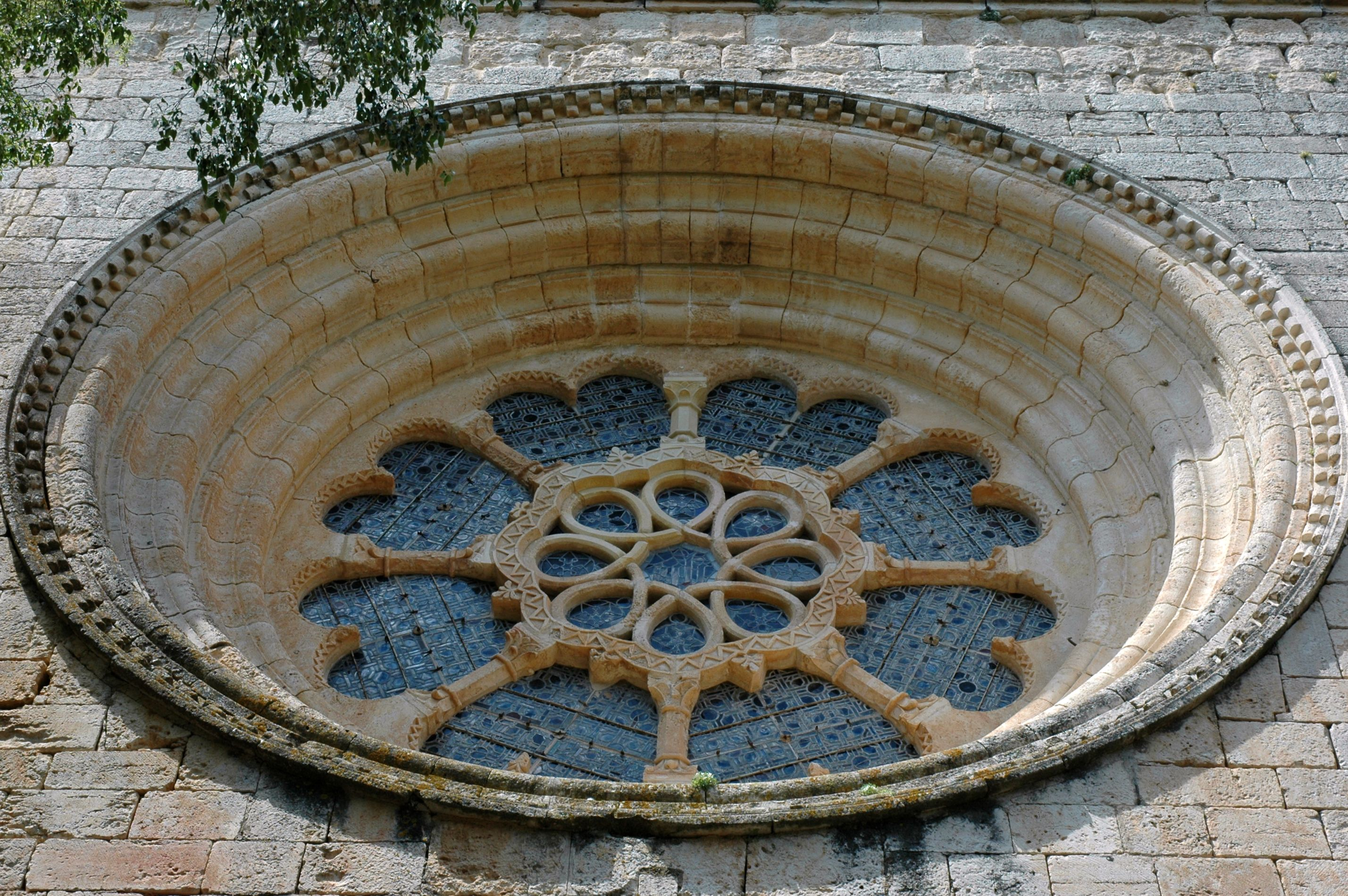 Monestir de Santes Creus - Rosassa